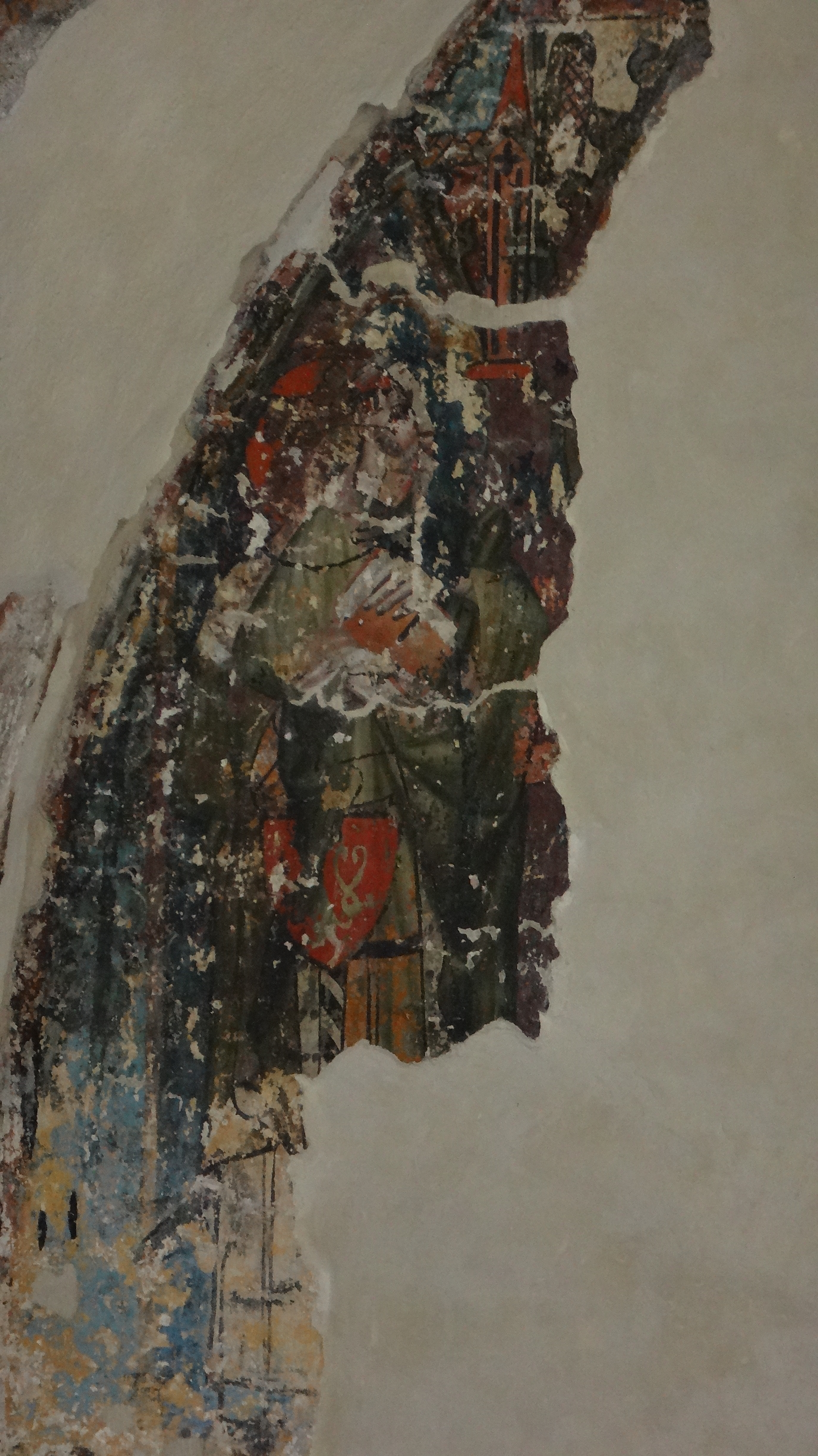 pozůstatek fresky